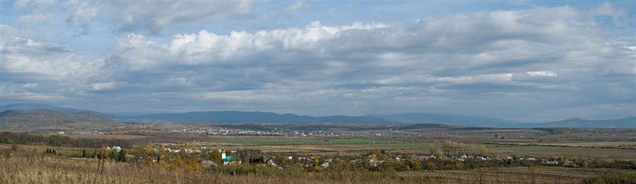 с. Вовкове (Вовквовиї ), літня панорама.